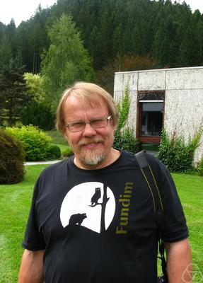 Foto di Juhani Karhumäki